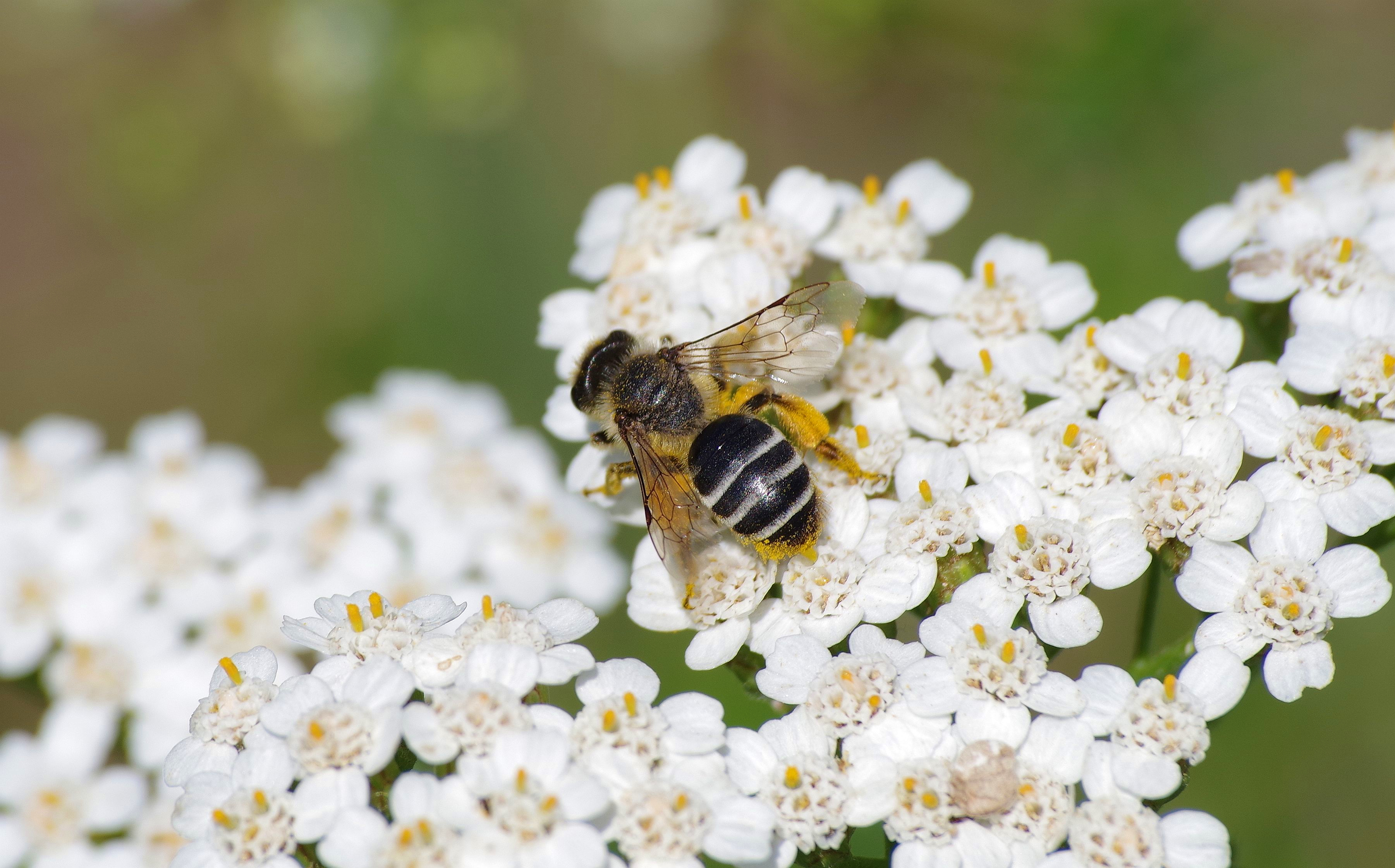 Pískorypka obecná živící se na své oblíbené rostlině.